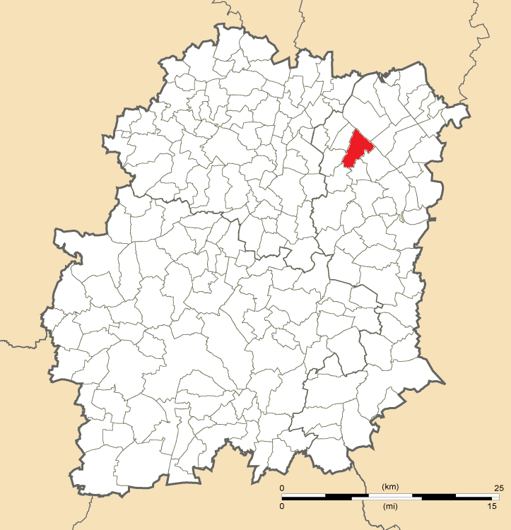 Carte de position de Ris-Orangis en Essonne (91)